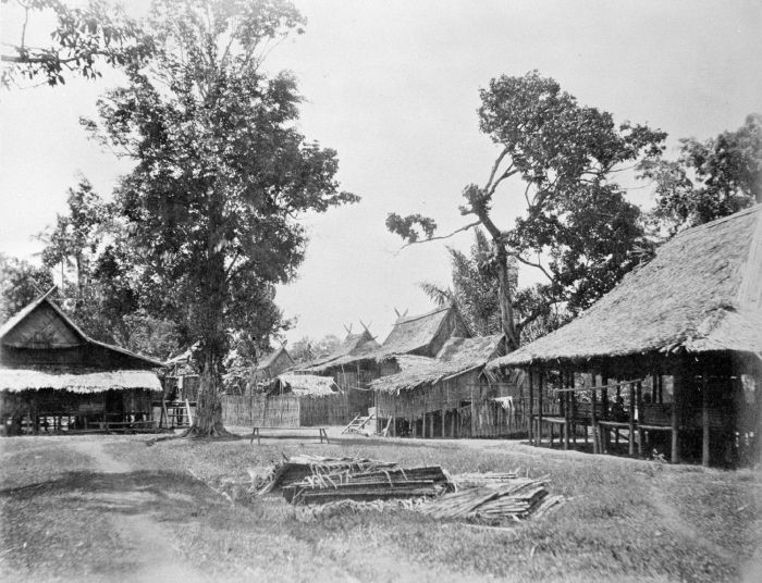 Foto. Deze foto is gemaakt tijdens de Sumatra Expeditie van 1877-1879. Landschappen uit de afdeeling Rawas.. Pasar te Soeroelangoen, Palembangsche Bovenlanden, Sumatra